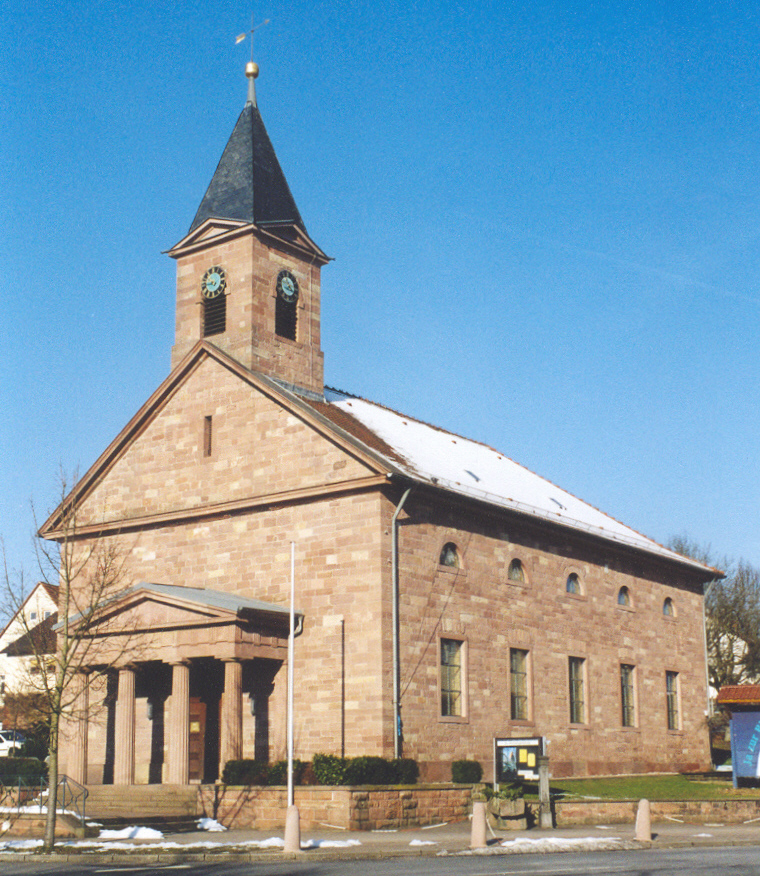 Evang. Kirche im Weinbrenner-Stil, erbaut 1830. Sie gehört zu den schönsten Kirchen des Klassizismus in Baden. Reizvoll die Ausführung in rotem Sandstein, sowie eine kleine Säulenhalle. Statt eines Kirchturmes belebt ein Dachreiter die Vorderseite des Langhauses. Auf der Eingangsseite lassen sich ungewöhnlicherweise gleich drei Dreiecksgiebel sichten : die Säulenhalle, das Langhaus und der Dachreiter zeigen dieses typisch klassizistische Würdesymbol in verschiedenen Größen.